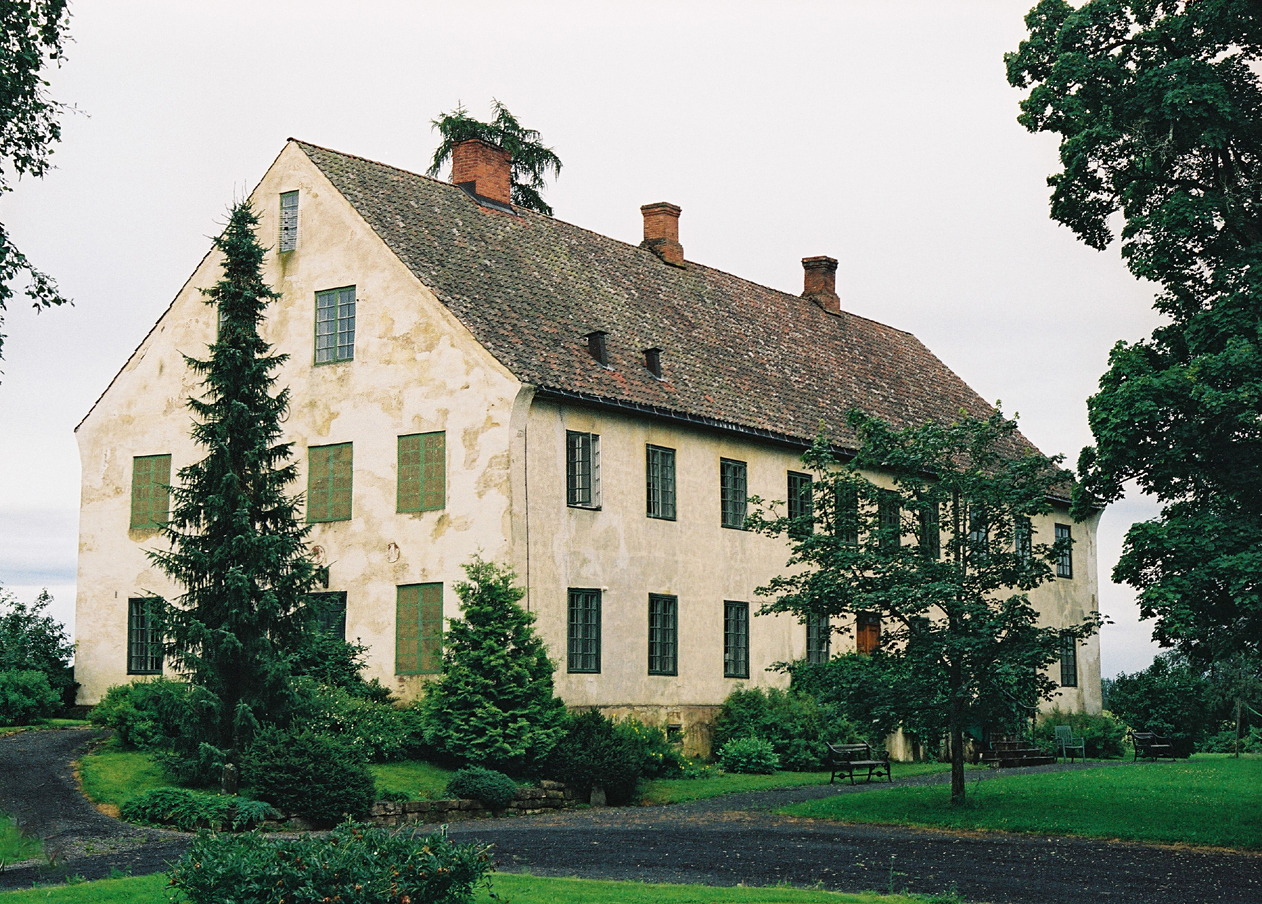 Hverven gård i Stange, Hedmark. Fredet i 1923.